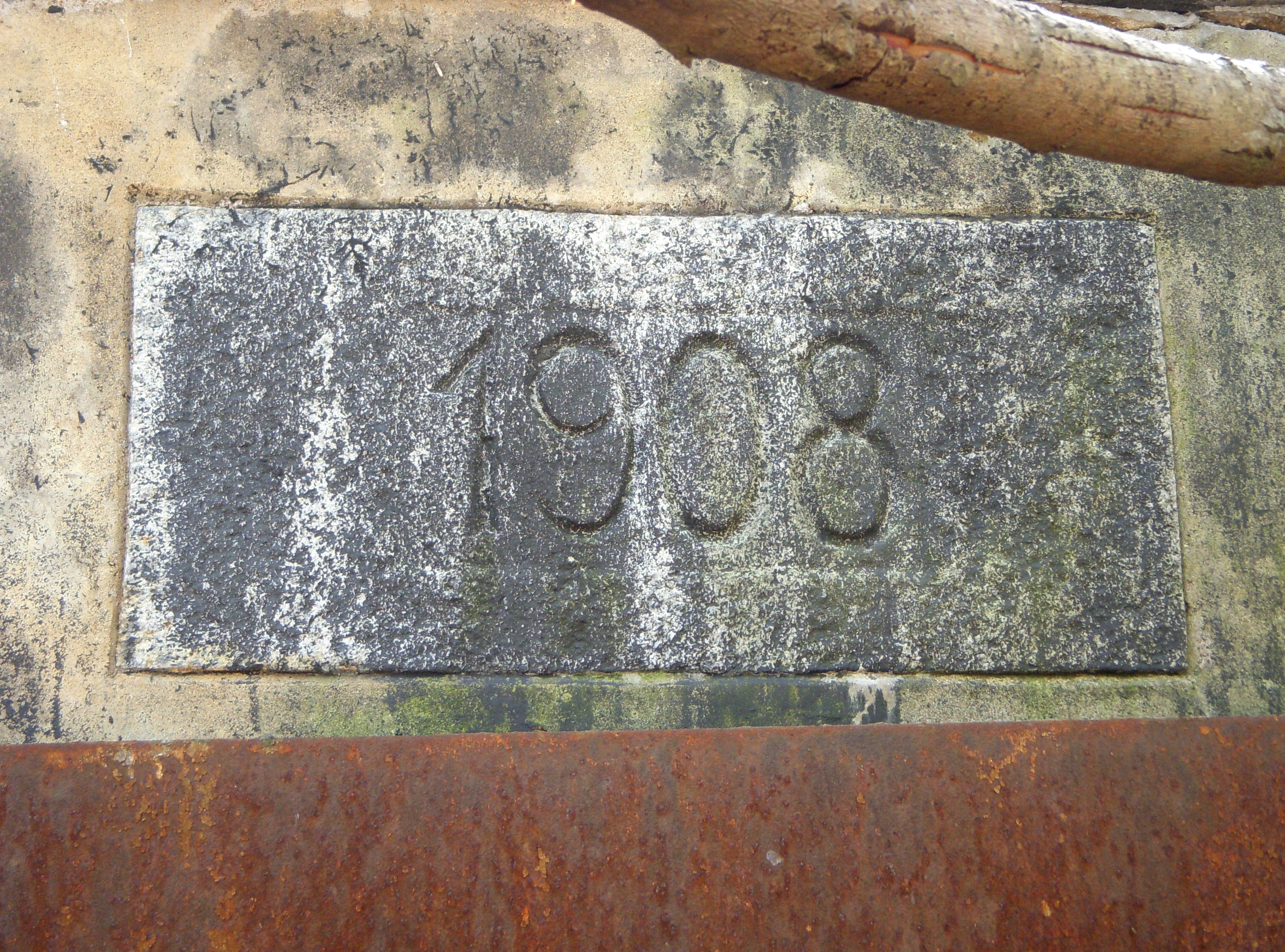 Magelungsfortet från första världskriget i Huddinge kommun, maj 2011